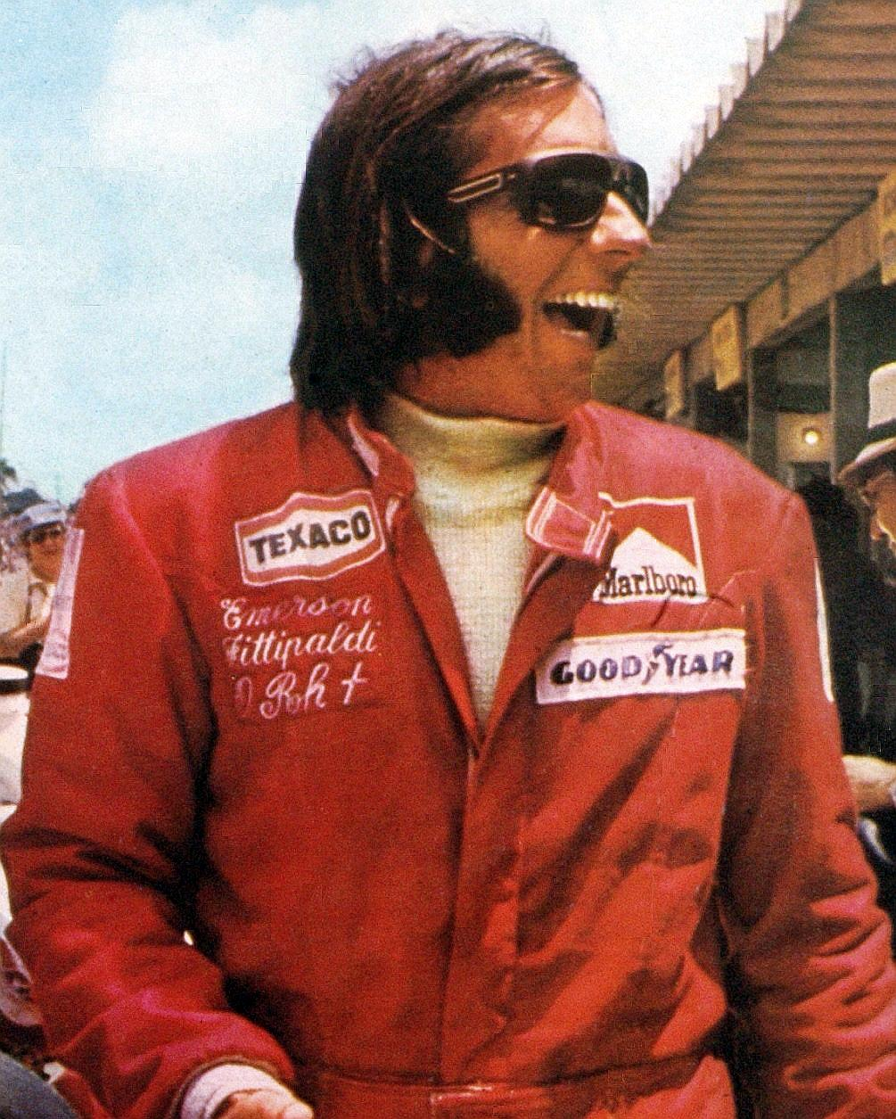 Fittipaldi - El Gráfico 2834 del 29 de Enero de 1974. Edicion 2834 (cropped)